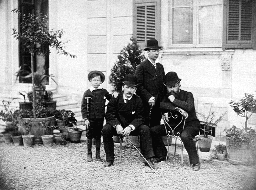 I fratelli Čajkovskij ritratti a Sanremo. Da sinistra a destra: : Nikolay Konradi (il bambino, pupillo di Modest), Modest Čajkovskij, Aleksey Sofronov, Čajkovskij.